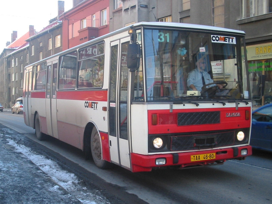 Karosa B 832 in Tábor, 2004-03-05